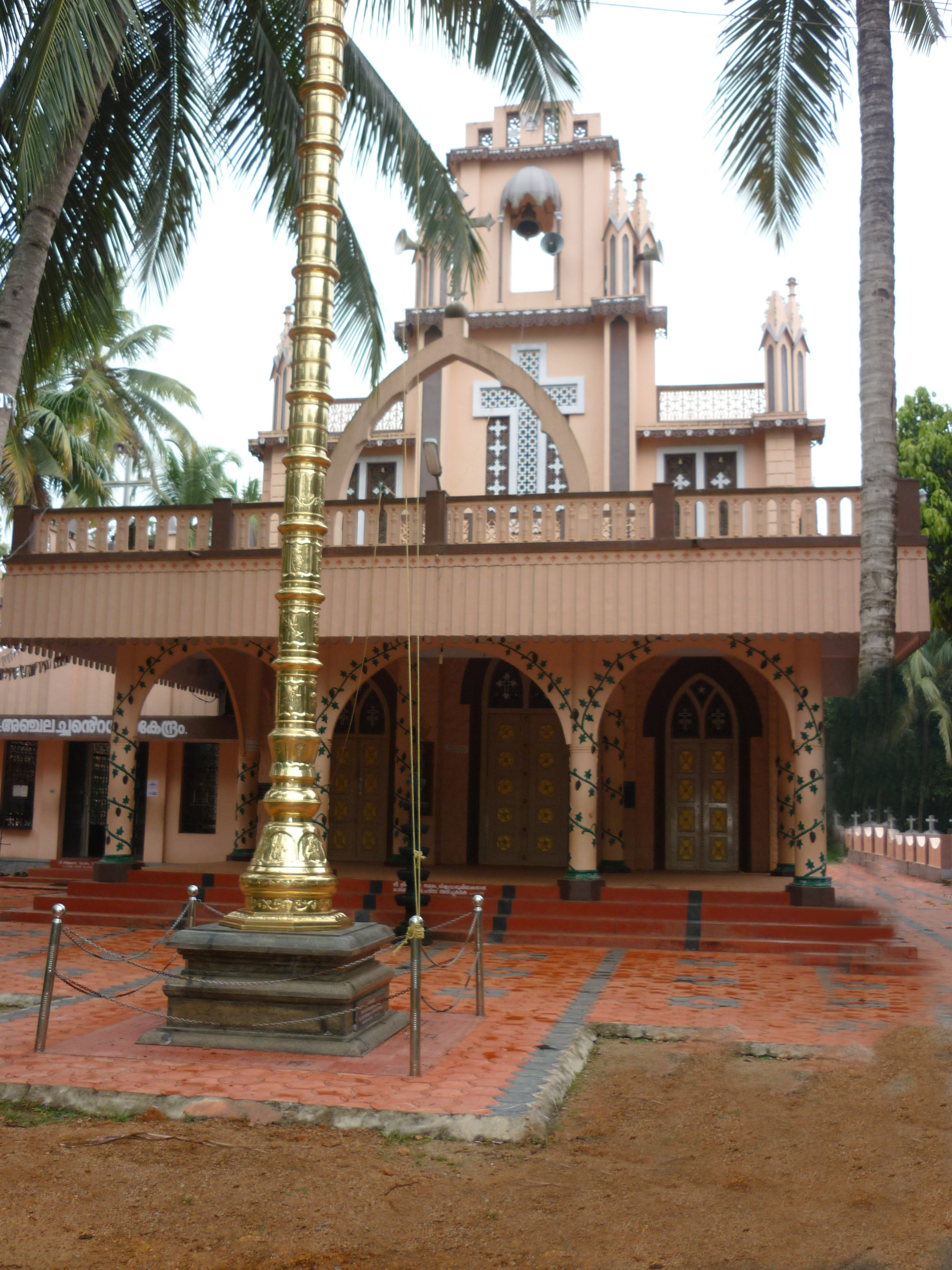 ആഞ്ചൽ പള്ളി